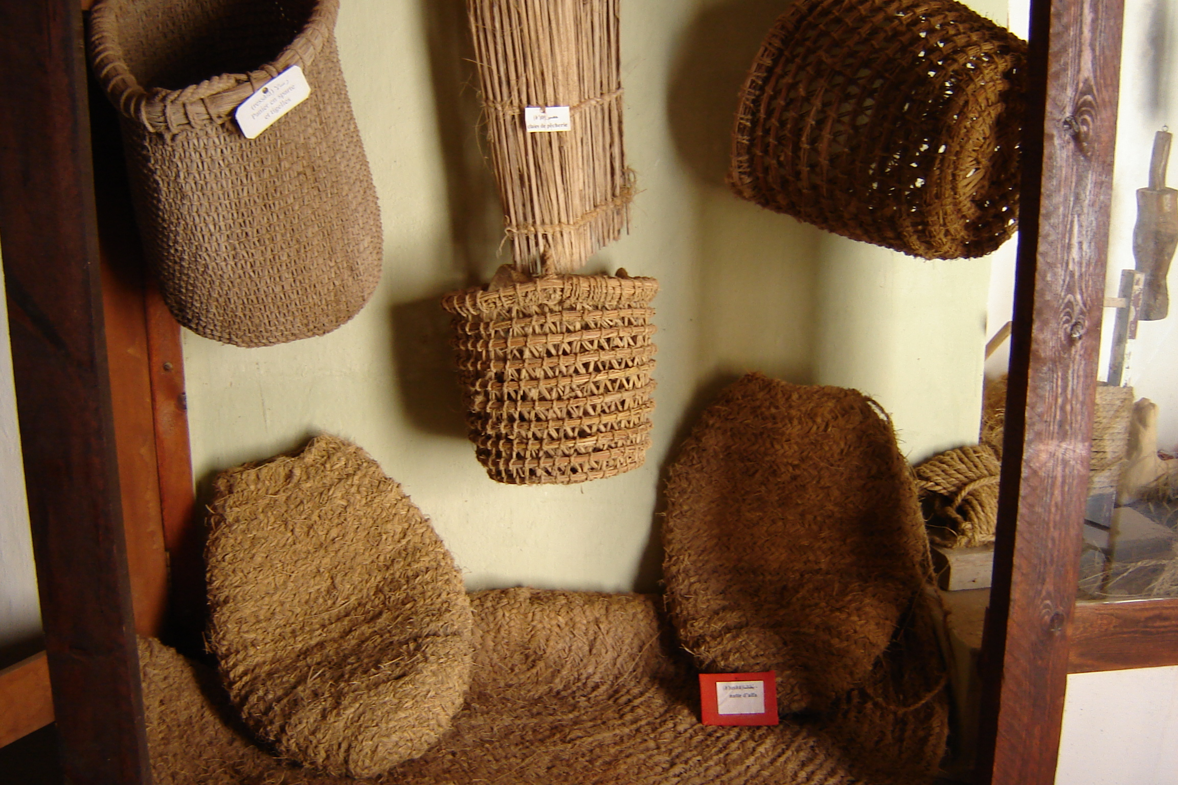 Photographie personnelle prise en juillet 2007 d'une vitrine du musée des arts et traditions populaires de Kerkennah à El Abbassia, montrant plusieurs articles artisanaux fabriqués localement à partir d'alpha et de palmes.